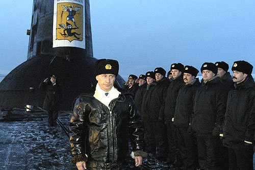 СЕВЕРОМОРСК. Владимир Путин на подводном ракетном крейсере «Архангельск».